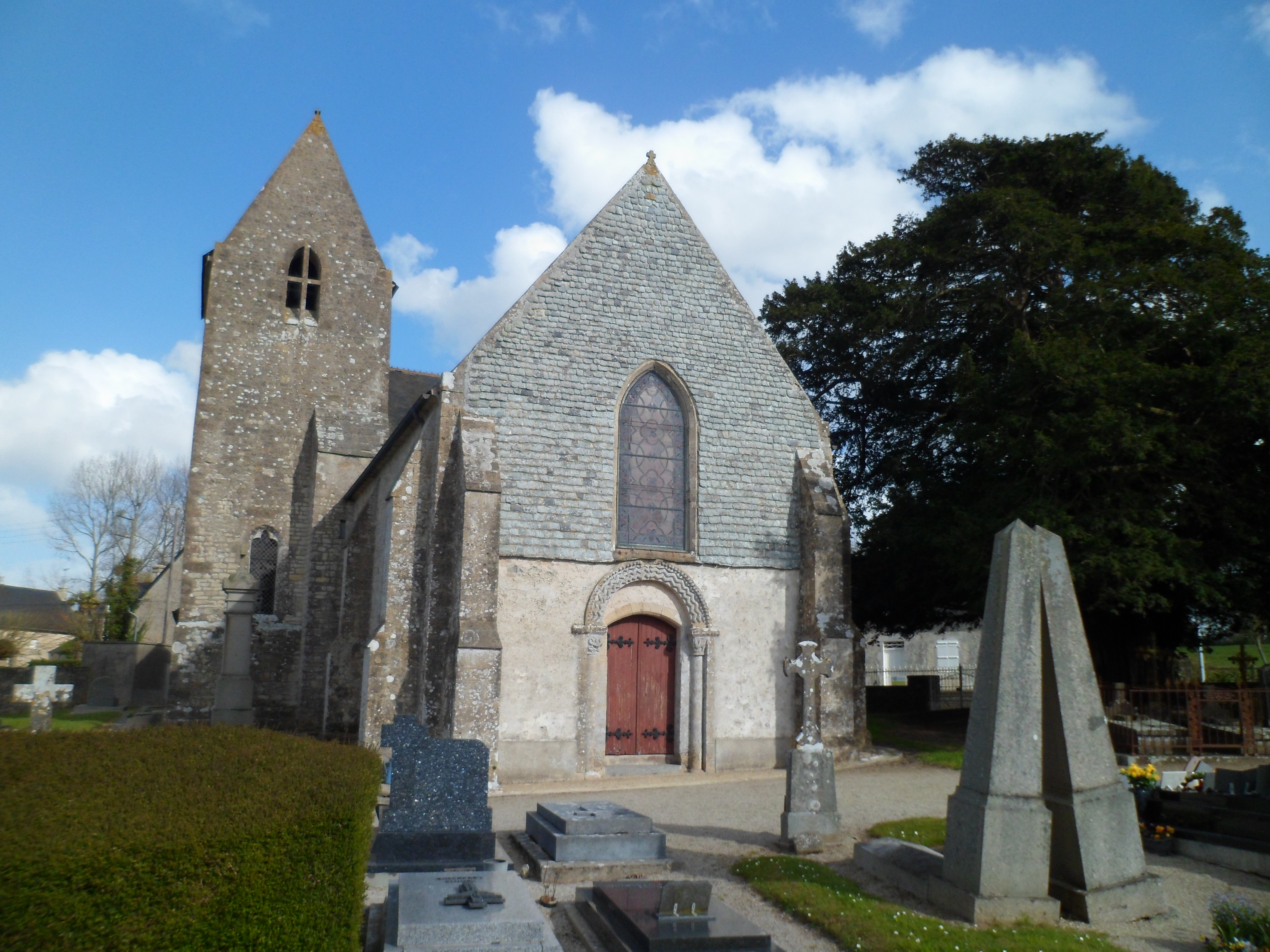 Église Saint-Hermeland de Boutteville